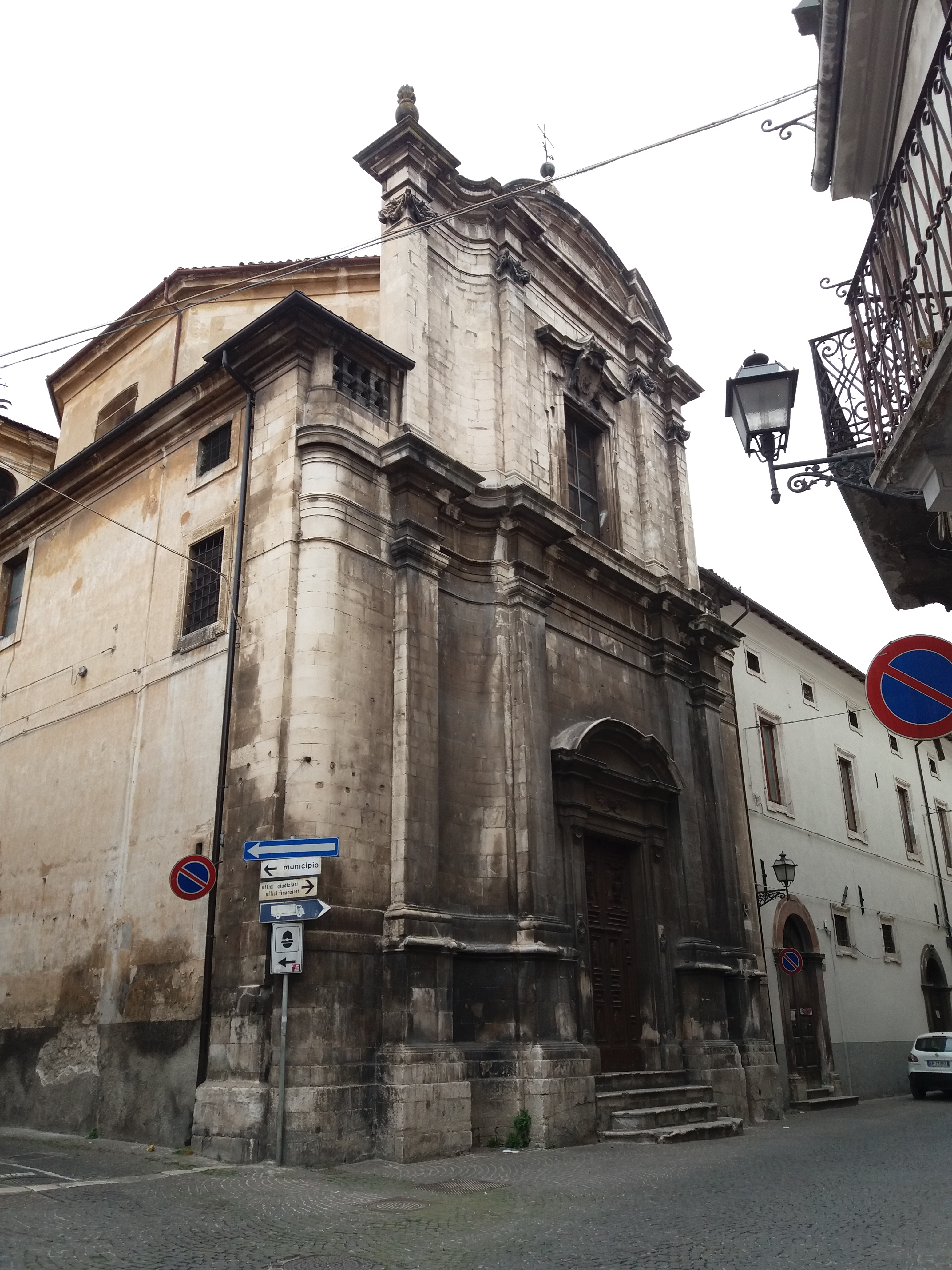 Sulmona: Chiesa e di Santa Caterina d’Alessandria